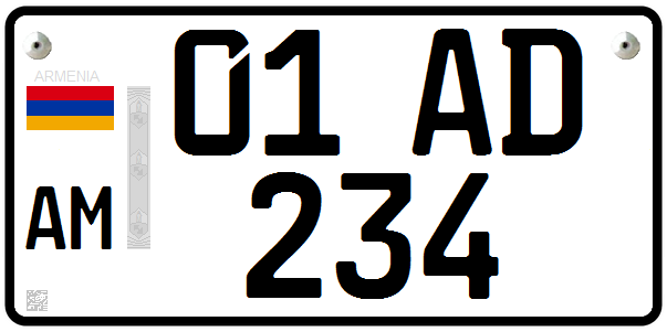 پلاک خودروهای شخصی در ارمنستان